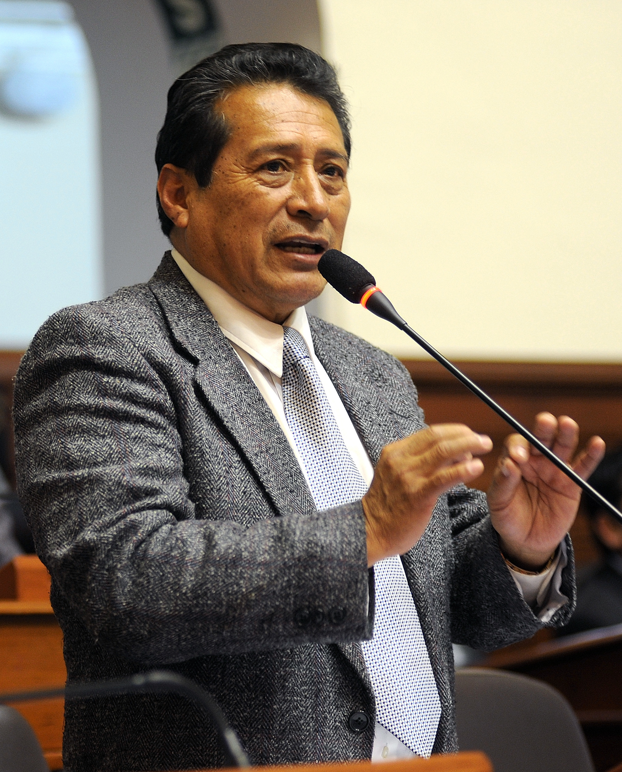 El congresista Daniel Robles López fija su posición en el debate parlamentario realizado esta tarde por el Pleno.